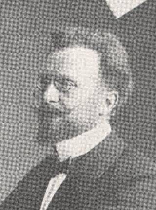 Adolf Dyroff, Philosophieprofessor Bonn